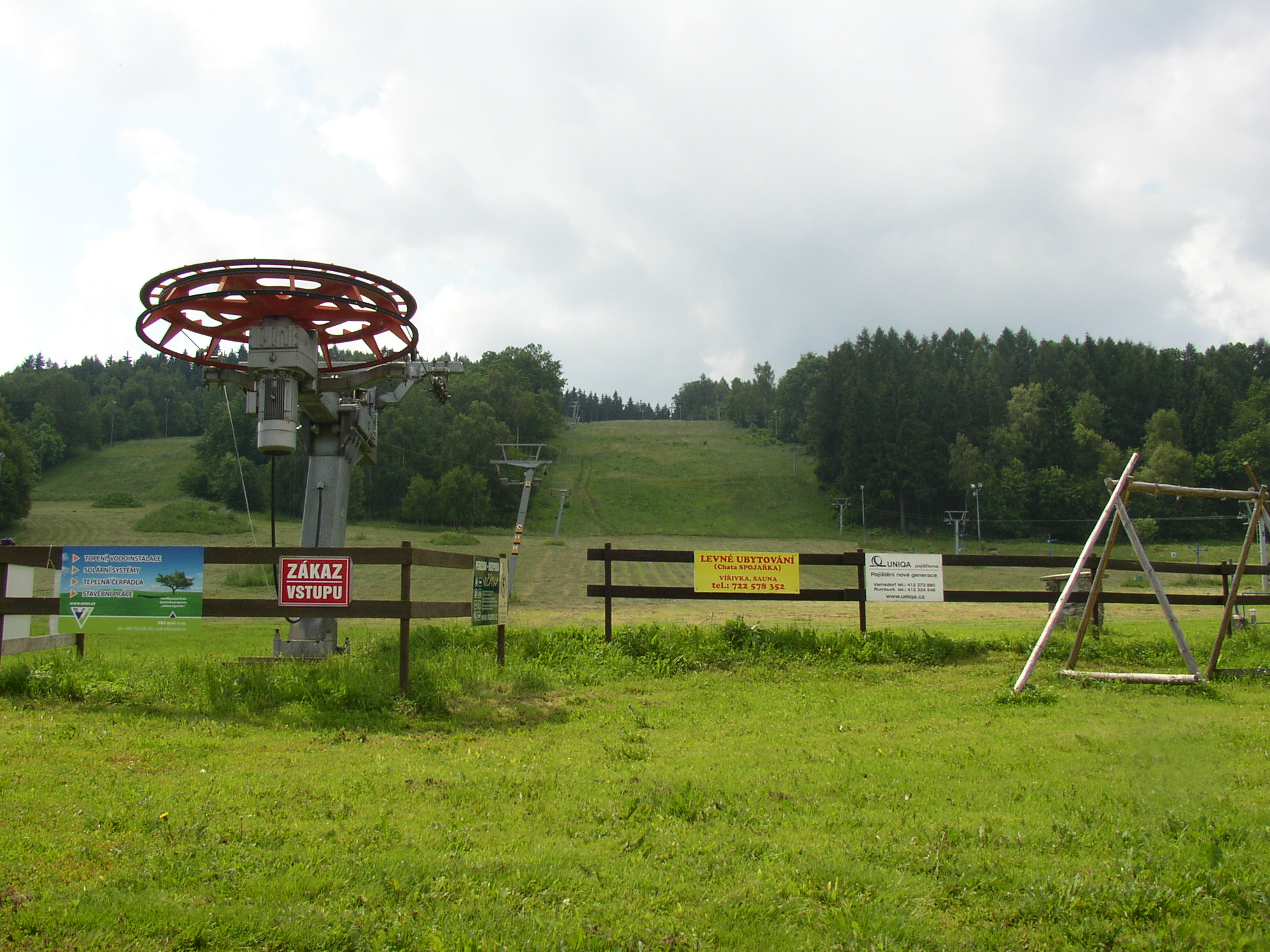 Česky: Lyžařský vlek Horní Podluží